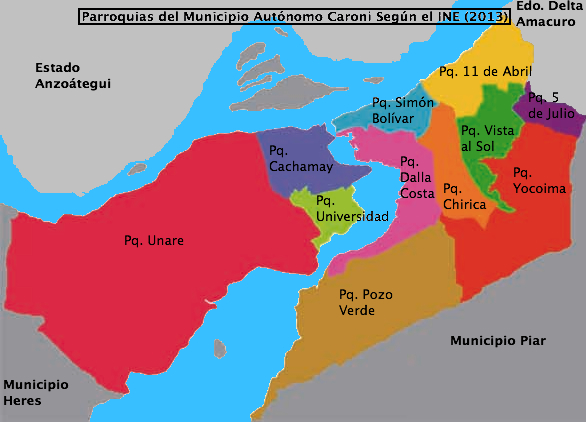 Mapa del municipio caroní con sus parroquias según el último informe del INE